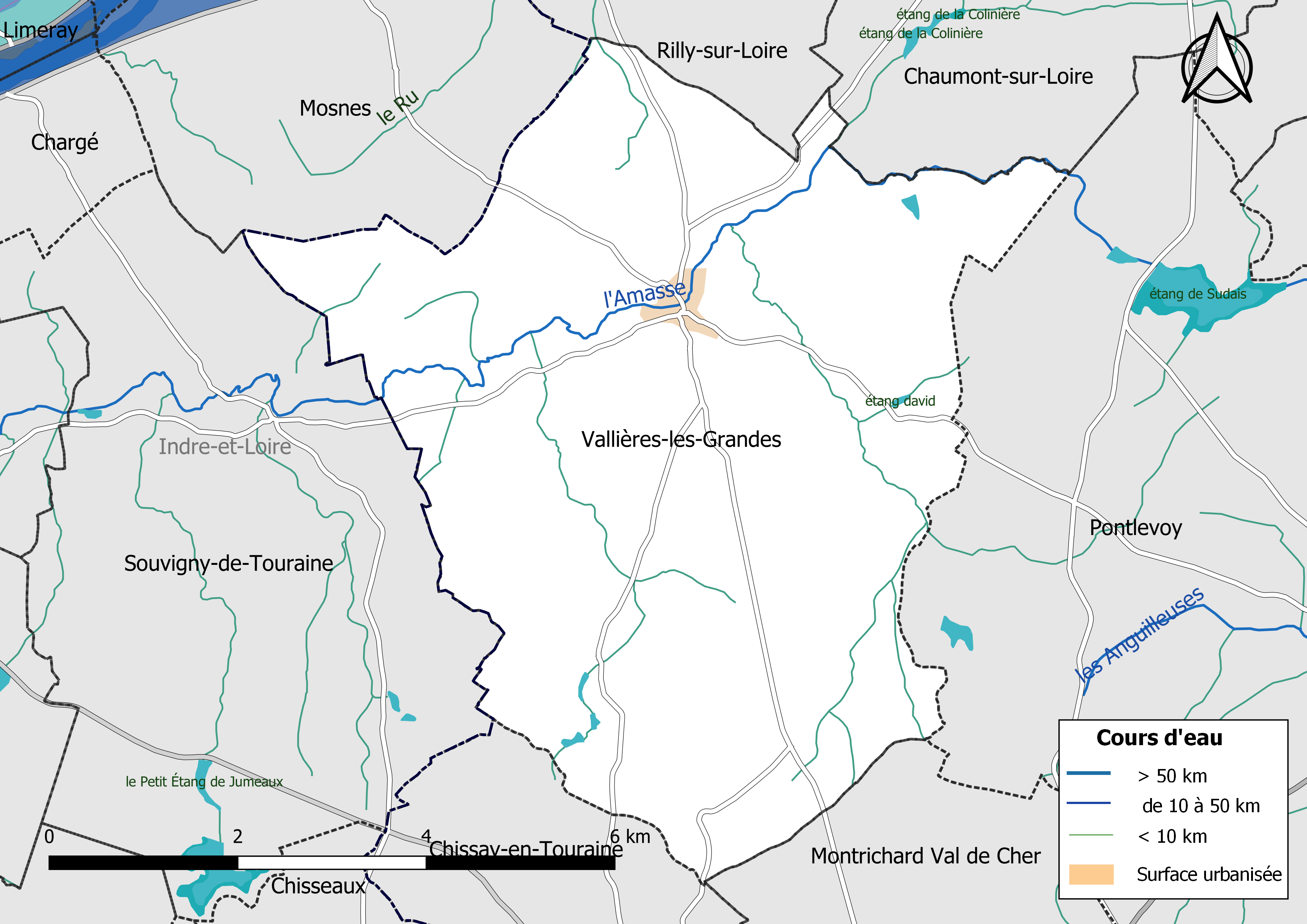 Carte du réseau hydrographique de la commune de Vallières-les-Grandes (Loir-et-Cher, France).